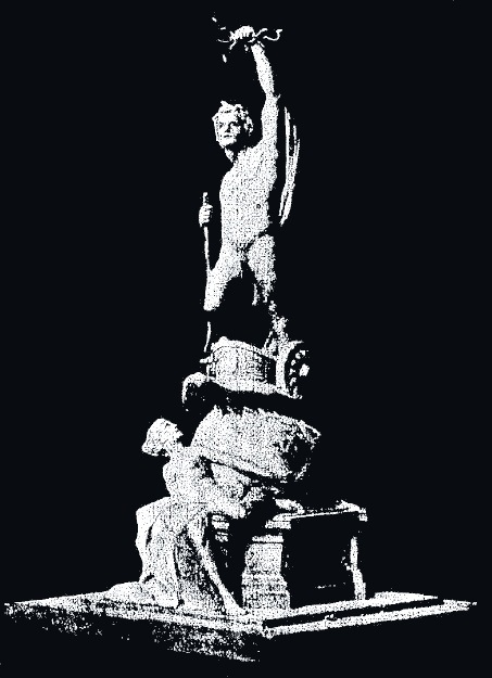 Le Motor Car Trophée en argent massif du Motor Car Club de Londres, offert au vainqueur du Paris-Marseille-Paris 1896 - Le Véloce-sport du 1er octobre 1896, article "L'aller de Paris-Marseille à Paris" de J-H Aubry